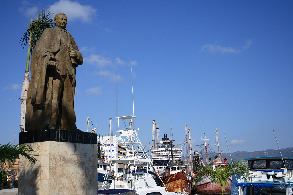 (Descripción original en Flickr): Ese es el nombre completo de mi ciudad, en la foto, el malecón y la estatua de Benito Juarez.